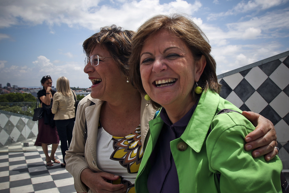 As candidatas do PS nas eleições para o parlamento europeu, Ana Gomes e Elisa Ferreira, antes de um almoço na Casa da Música, 4 Junho 2009, no Porto.